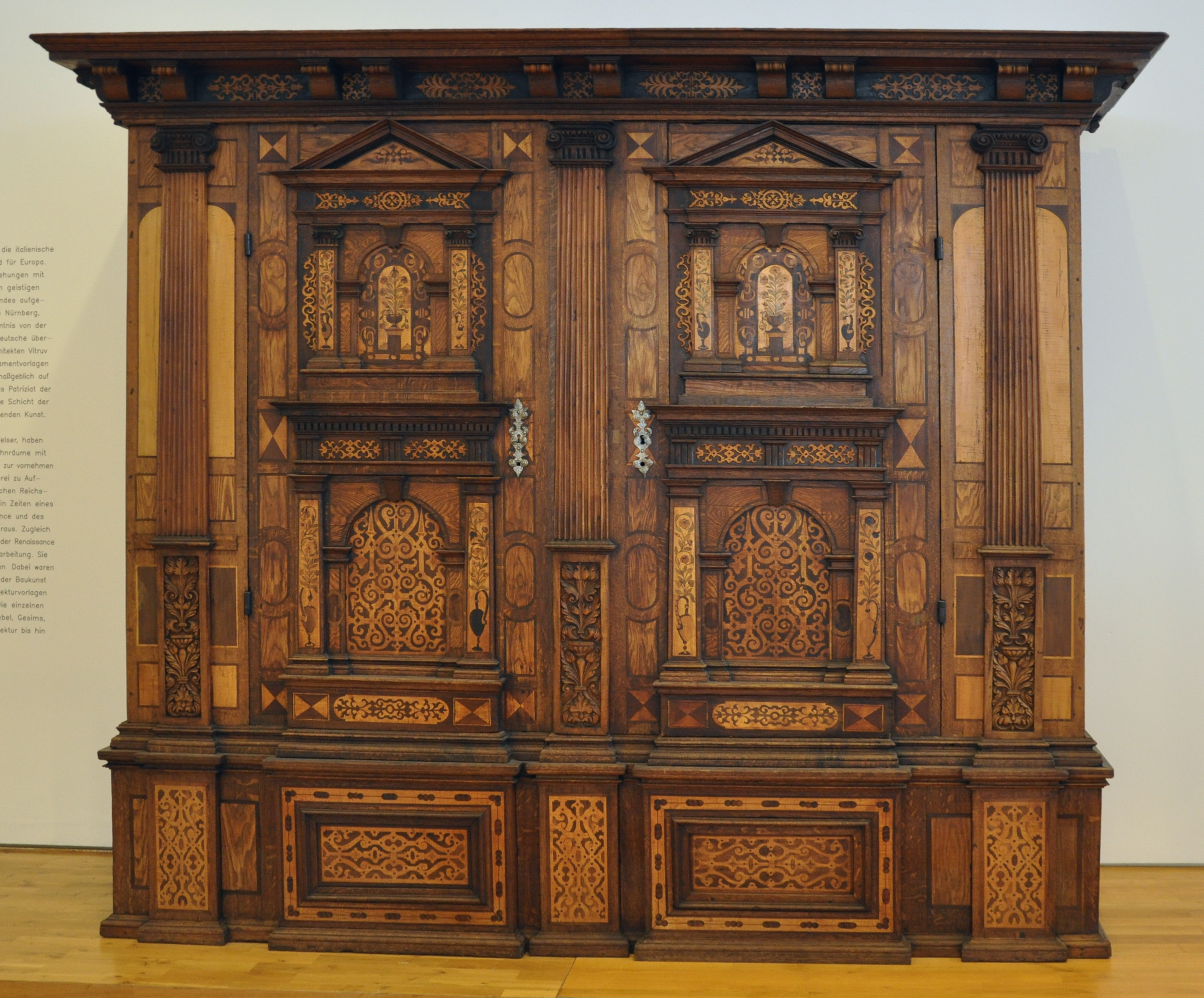 Fassadenschrank, Rothenburg ob der Tauber um 1570–1590; Korpus: Tanne, Eiche; Einlagen: Nussbaum, Ahorn, Obsthölzer Museum für Angewandte Kunst, Frankfurt am Main, Inv. Nr. 31